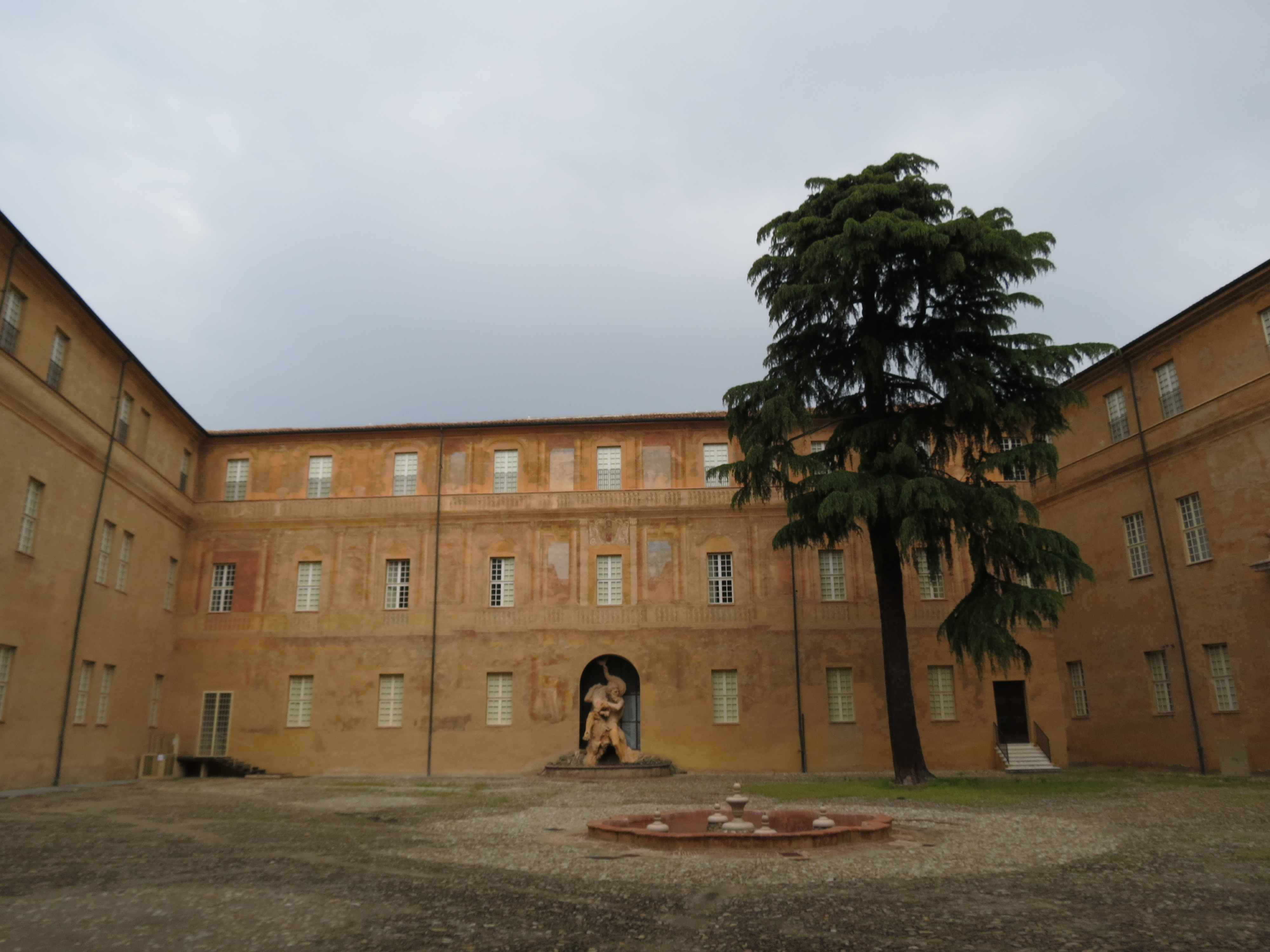 Cortile Interno del Palazzo Ducale di Sassuolo